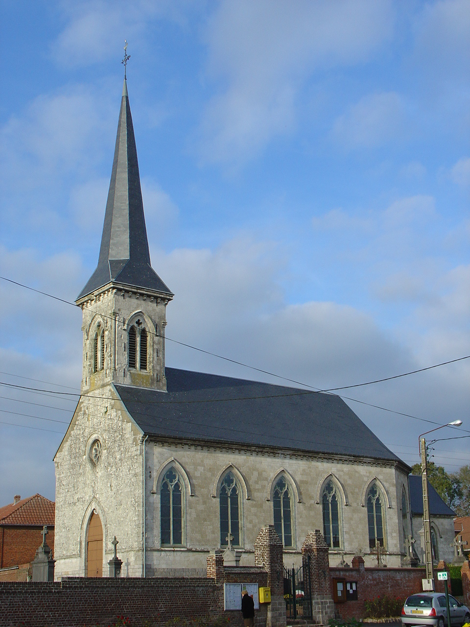 Église de La Thieuloye